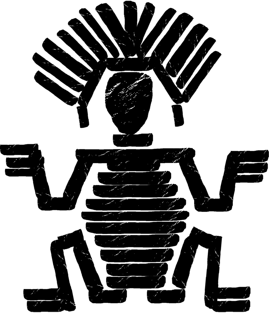 figura antropomorfa